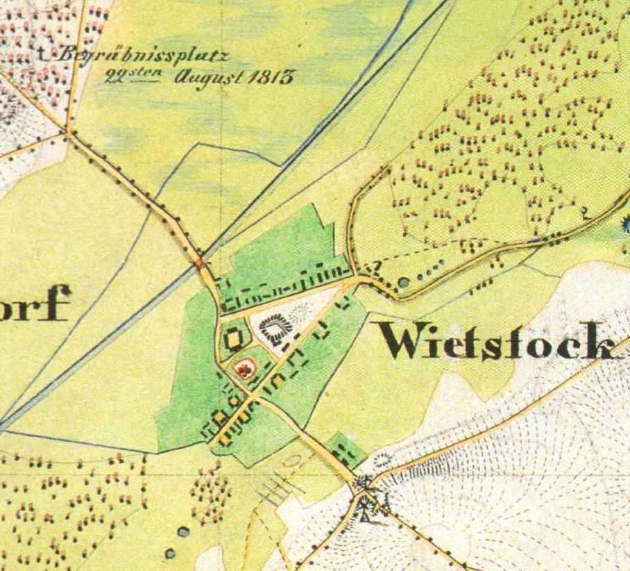 Wietstock, Stadt Ludwigsfelde, Brandenburg, Deutschland, Urmesstischblatt Blatt Trebbin, von 1840